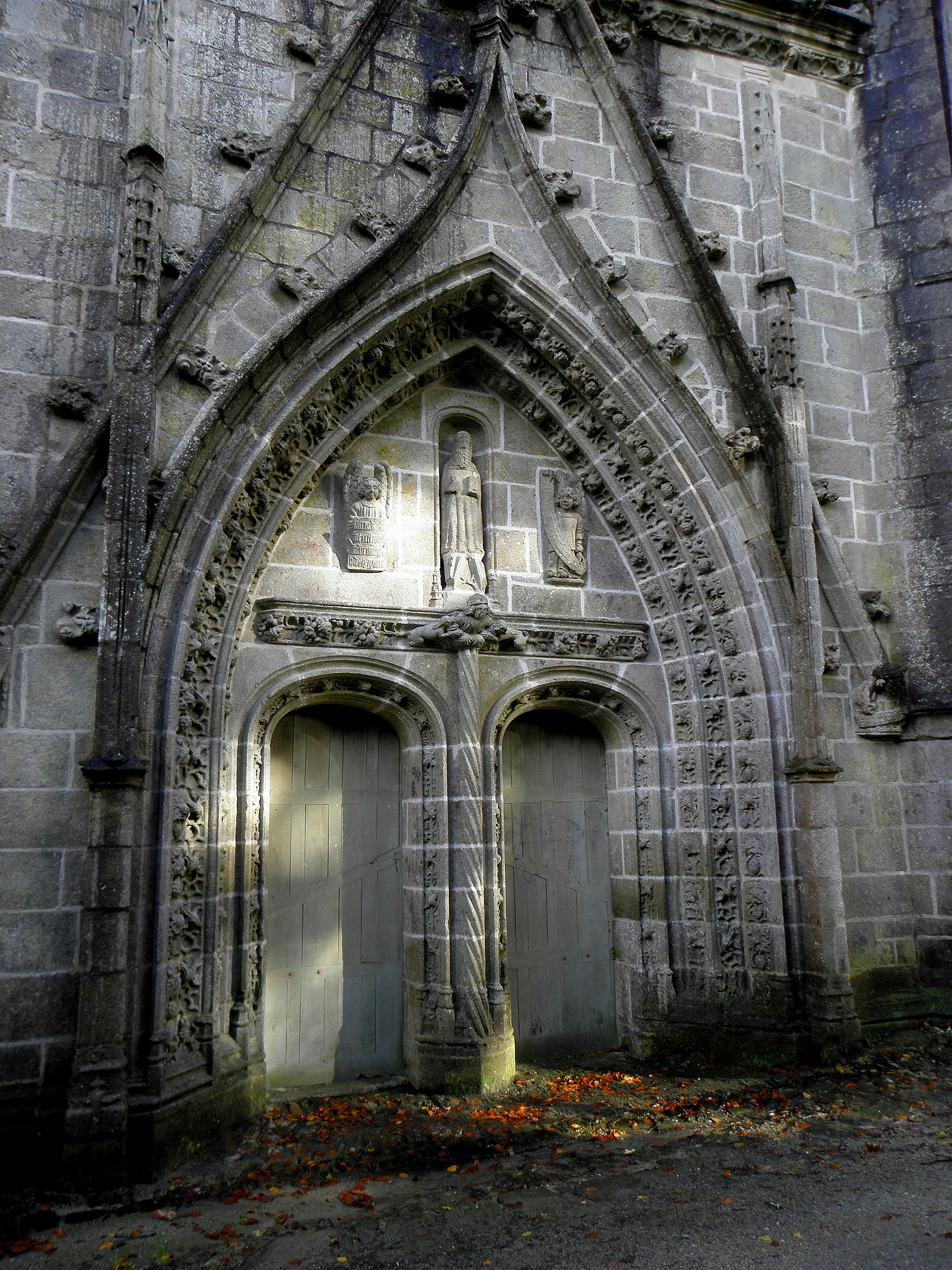 Façade ouest de la chapelle Saint-Herbot en Plonévez-du-Faou (29).